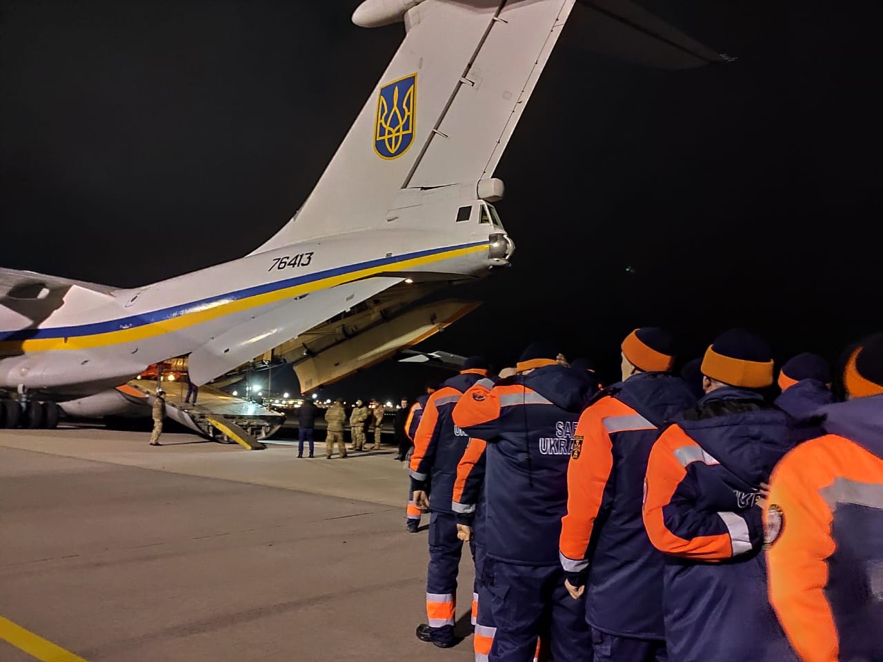 8 січня 2020 року, з міжнародного аеропорту «Бориспіль» до місця катастрофи літака «Міжнародних авіаліній України», що сталася вранці неподалік іранського міста Тегеран, вилетів літак транспортної авіації Повітряних Сил Збройних Сил України ІЛ-76 з оперативною групою на борту. Разом з фахівцями Національного бюро з розслідування авіаційних подій та інцидентів з цивільними повітряними суднами, Державної авіаційної служби, «Міжнародних авіаліній України» та представниками інших відомств, в Іран відправлені спеціалісти Головної інспекції Міністерства оборони України, які є експертами у сфері розслідування авіаційних катастроф та братимуть участь в роботі оперативної групи.